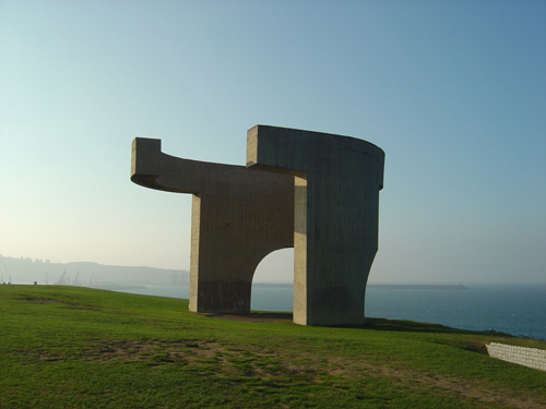 Escultura de Eduardo Chillida titulada Elogio del horizonte, y conocida popularmente como el Váter de King Kong, debido a su forma, a su tamaño y al sonido que se oye en su interior, producido por el eco del ruido del mar en la estructura curva. Situada en Gijón (España) Fotografía realizada el 14 de septiembre de 2005 por Ernesto Reiner y cedida a Usuario:Cornava para ser utilizada en Wikipedia.